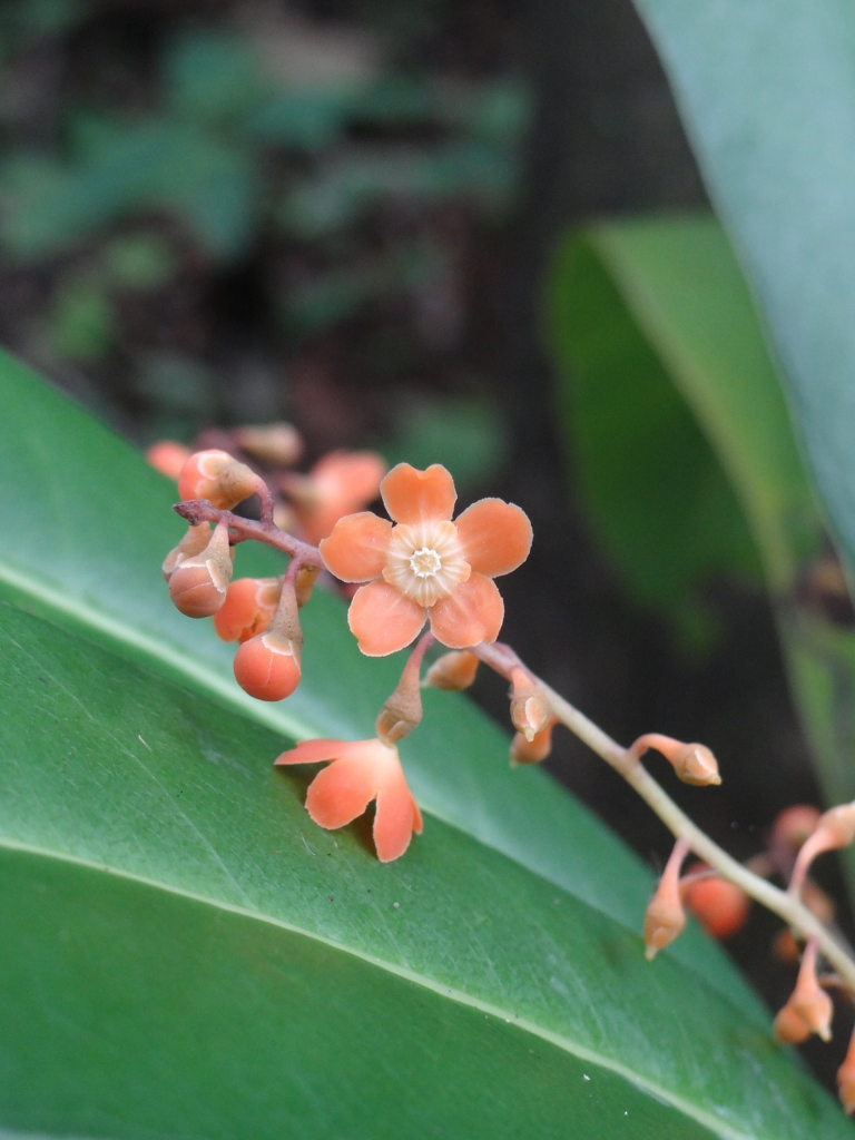 Clavija nutans (Vell.) B.Ståhl - PRIMULACEAE - Pirenópolis - Goiás - Brasil.